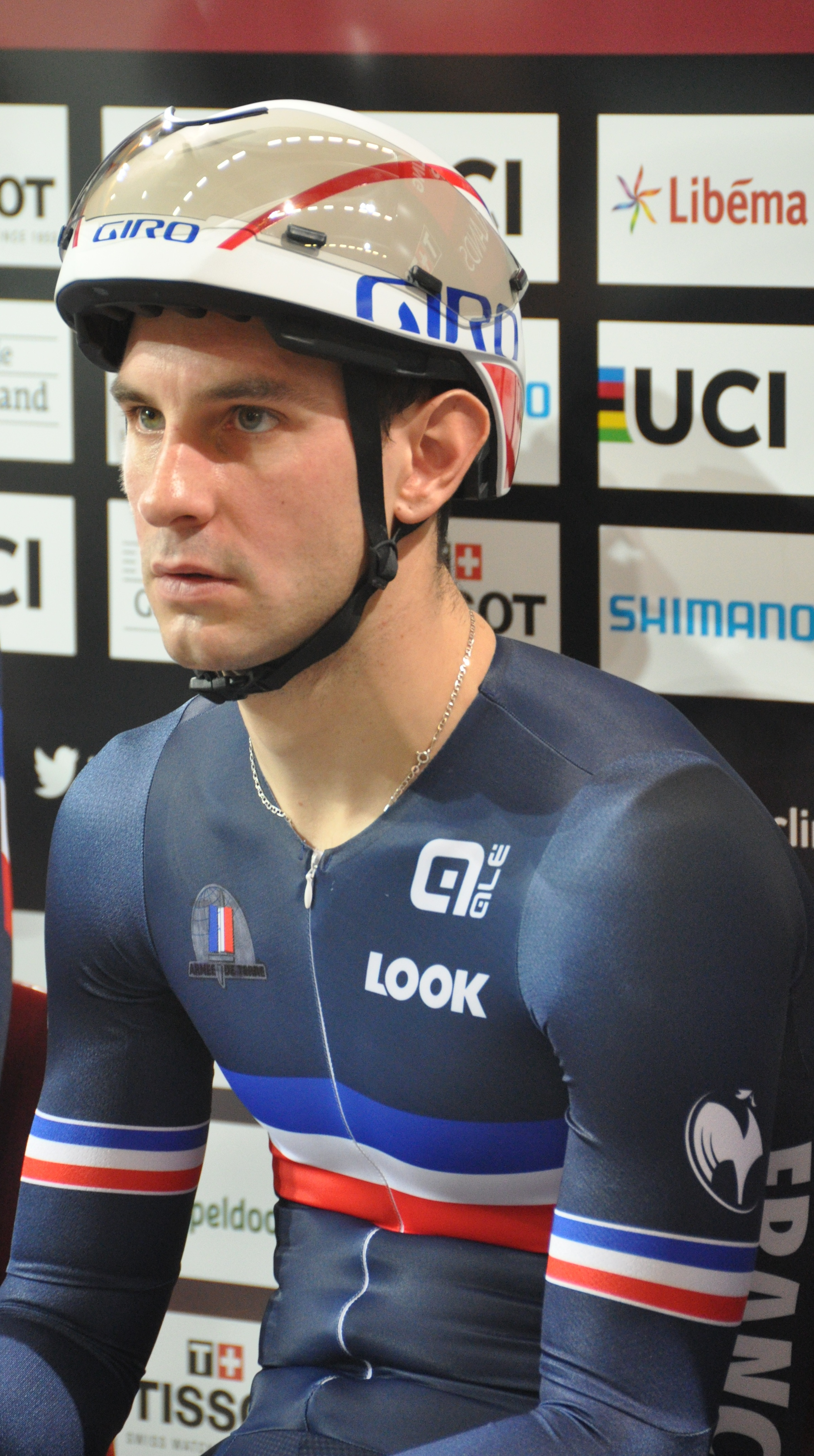 Morgan Kneisky, französischer Radsportler